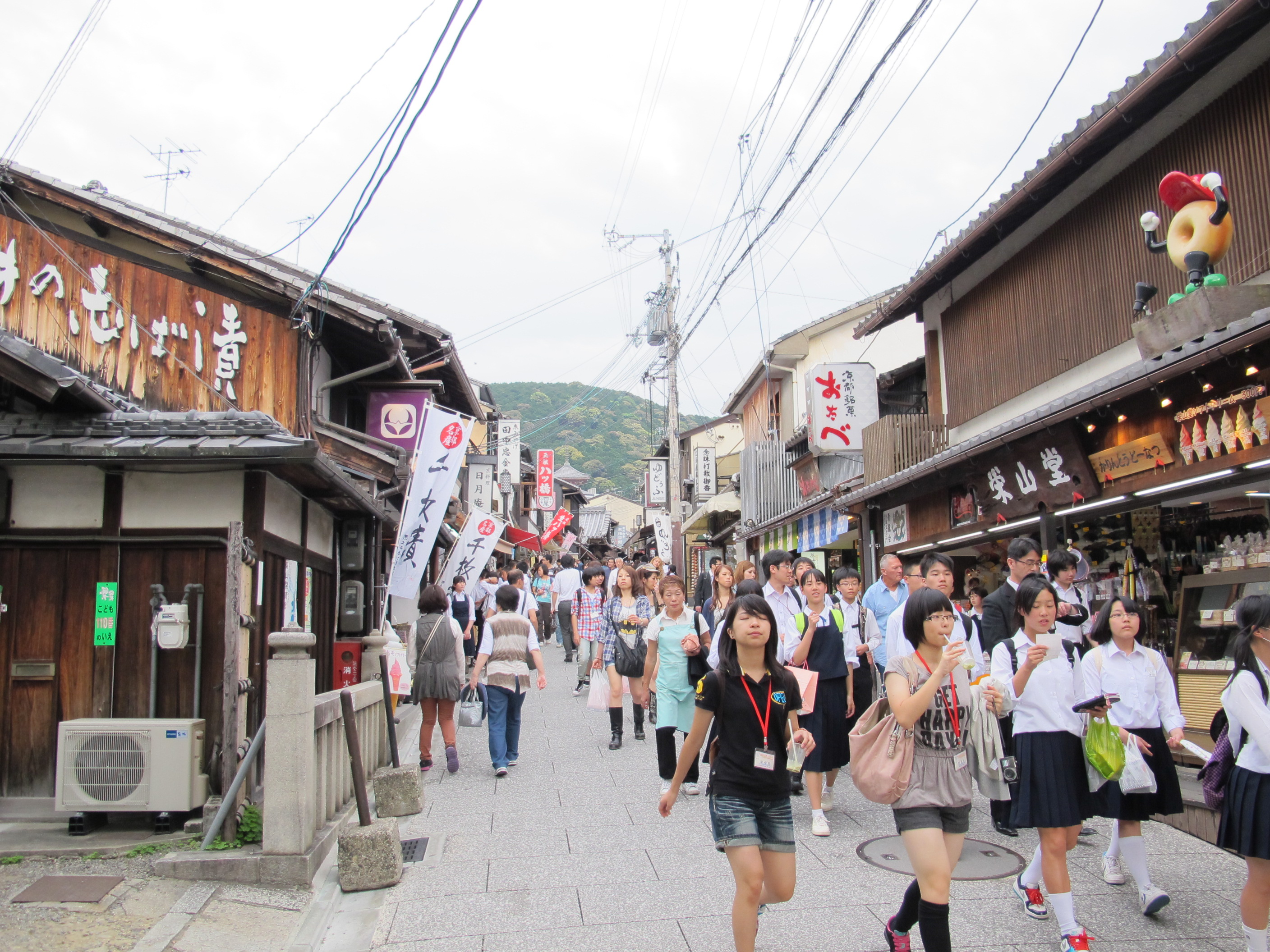 Kyomizuzaka